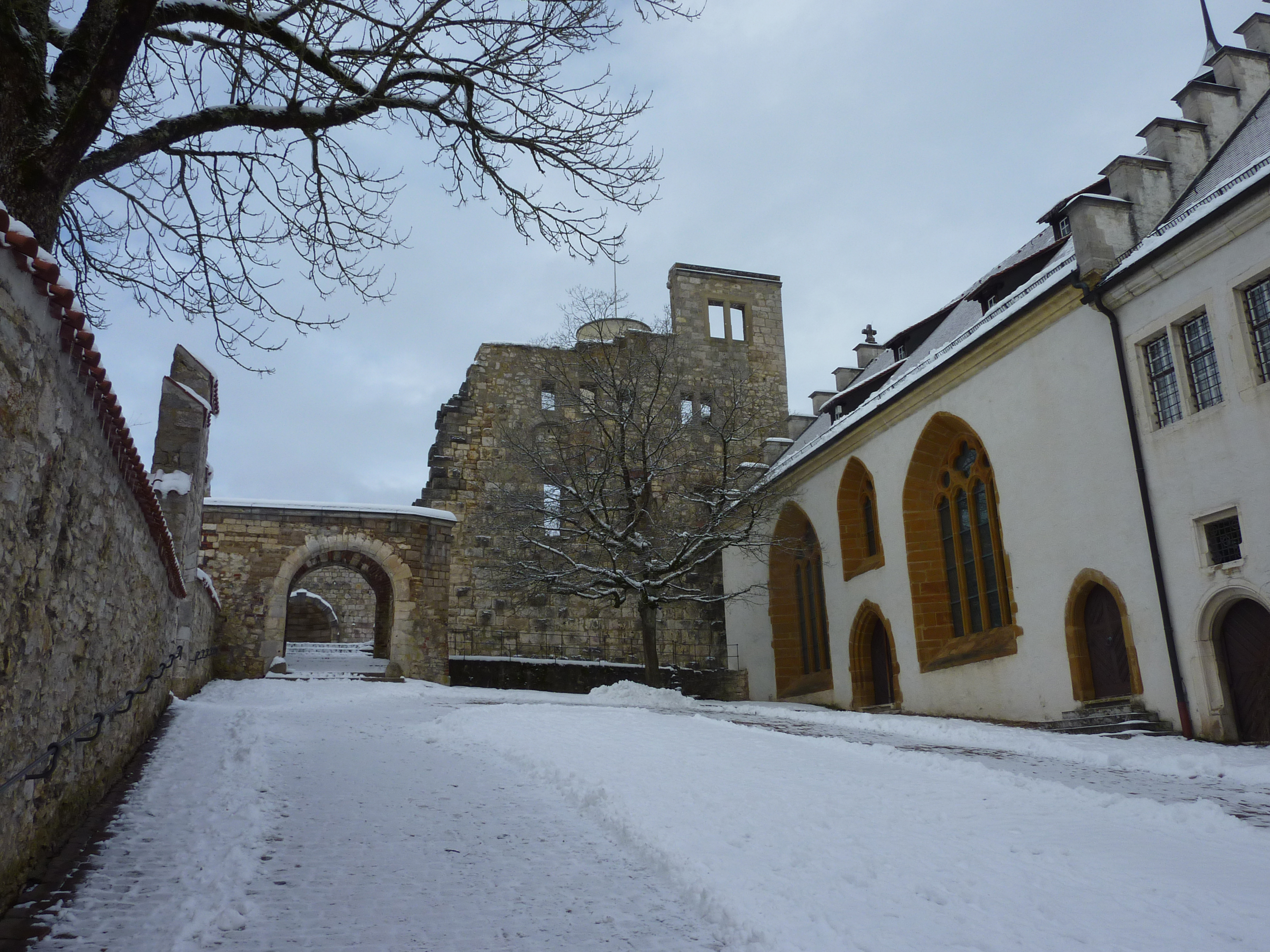 Schloss Hellenstein: Stauferzeitliche Kernburg (Mitte) und Schlosskirche (rechts).